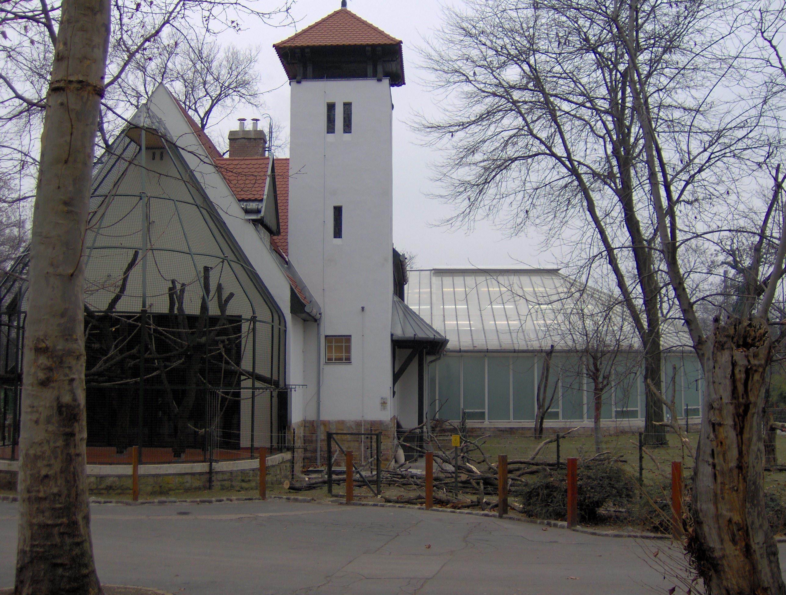 Budapesti állatkert, Majomház